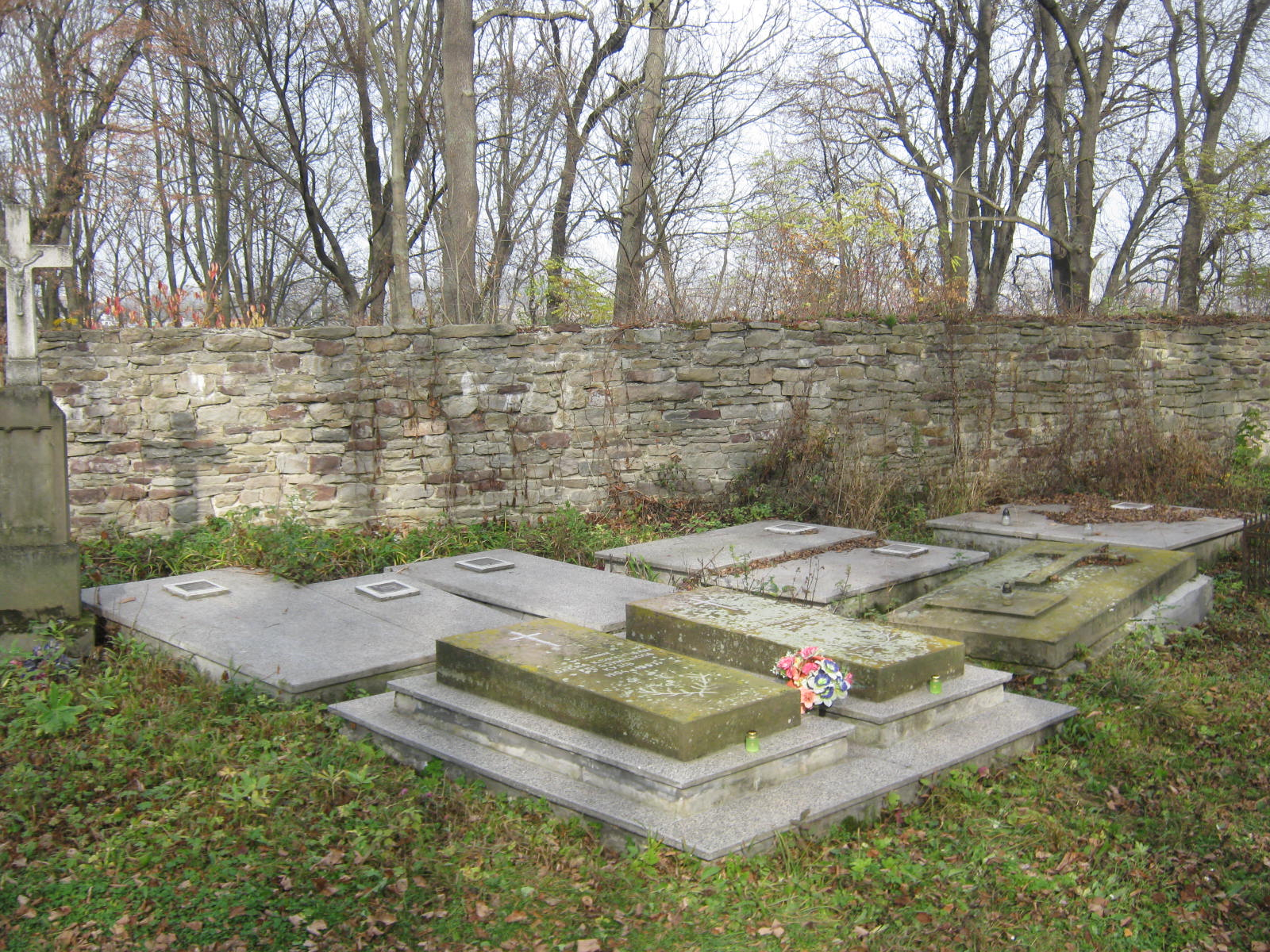 Поховання родин Рогозинських, Гринівих, Кузівих. Міський цвинтар на пагорбі Федір, м. Бучач, Тернопільщина